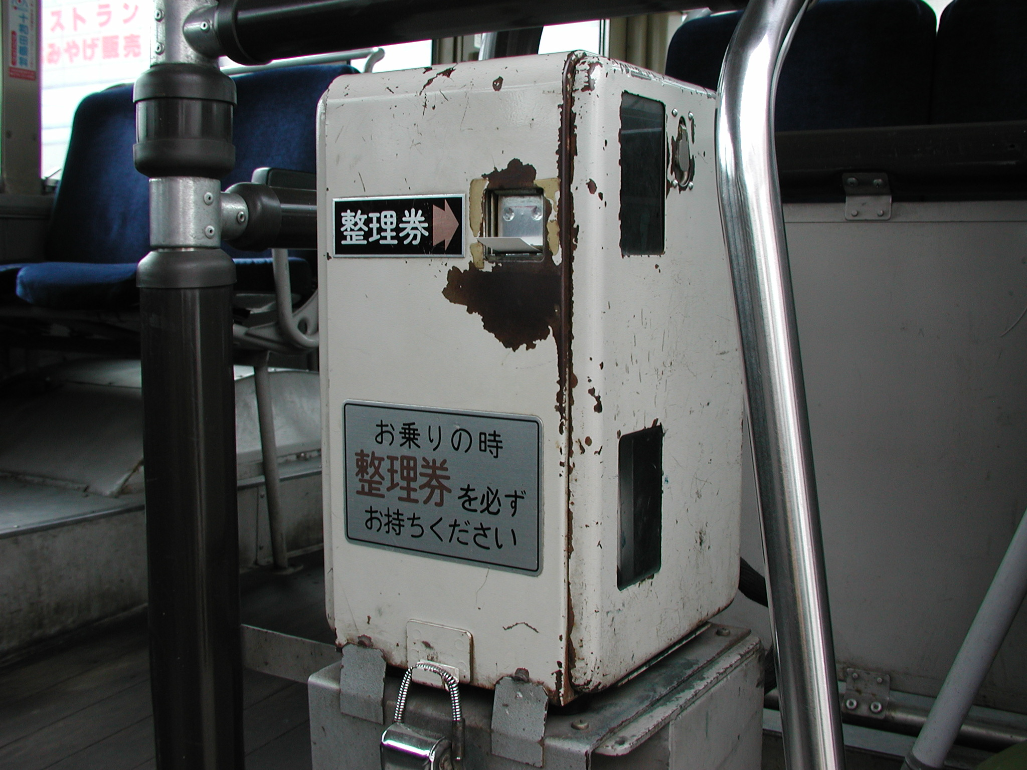 奈良工業製 スタンプ式整理券発行機 南部バス車内にて。